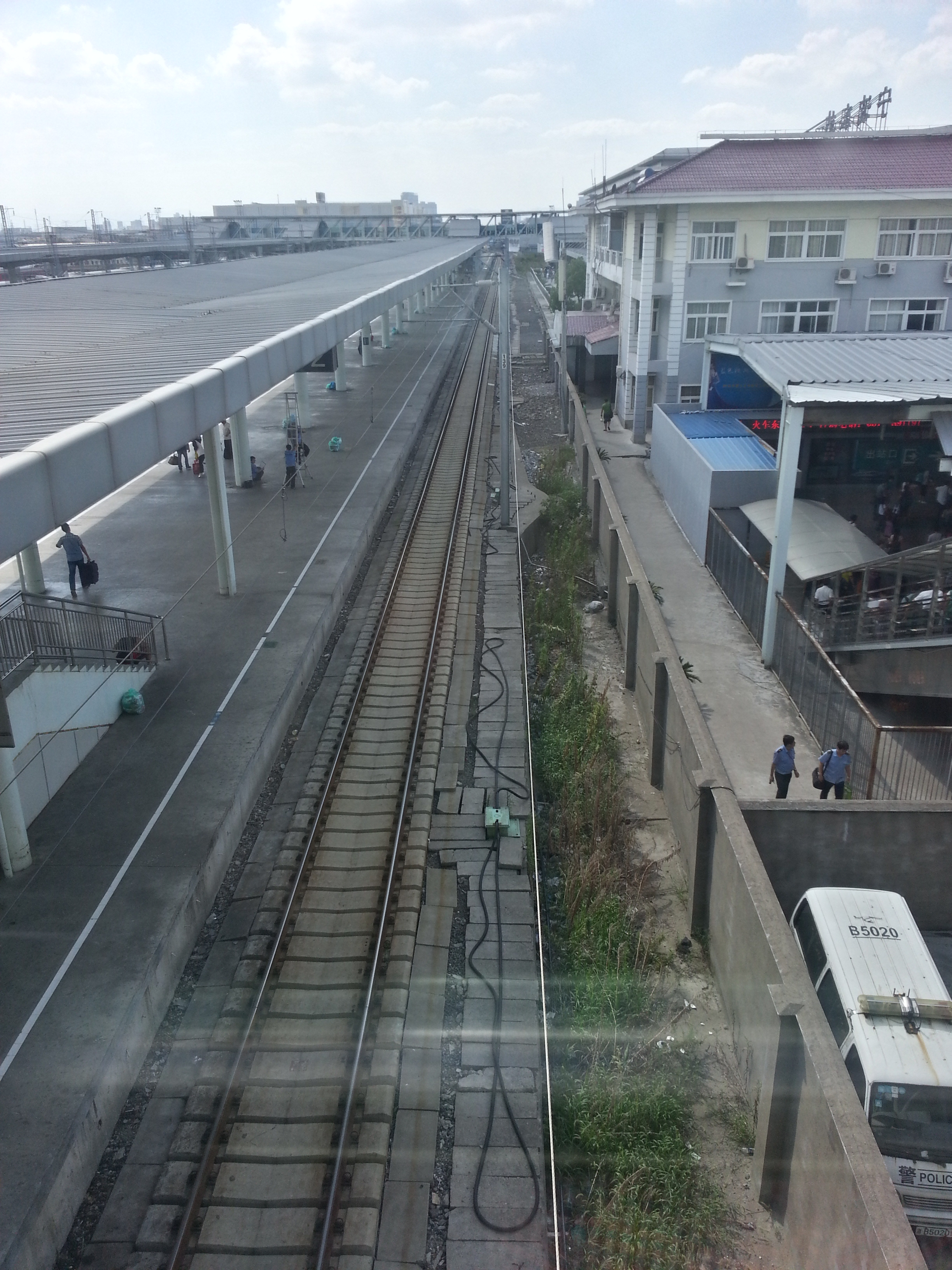 宁波东站1道和基本站台